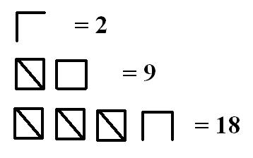 sistema de numeros unarios ejemplo